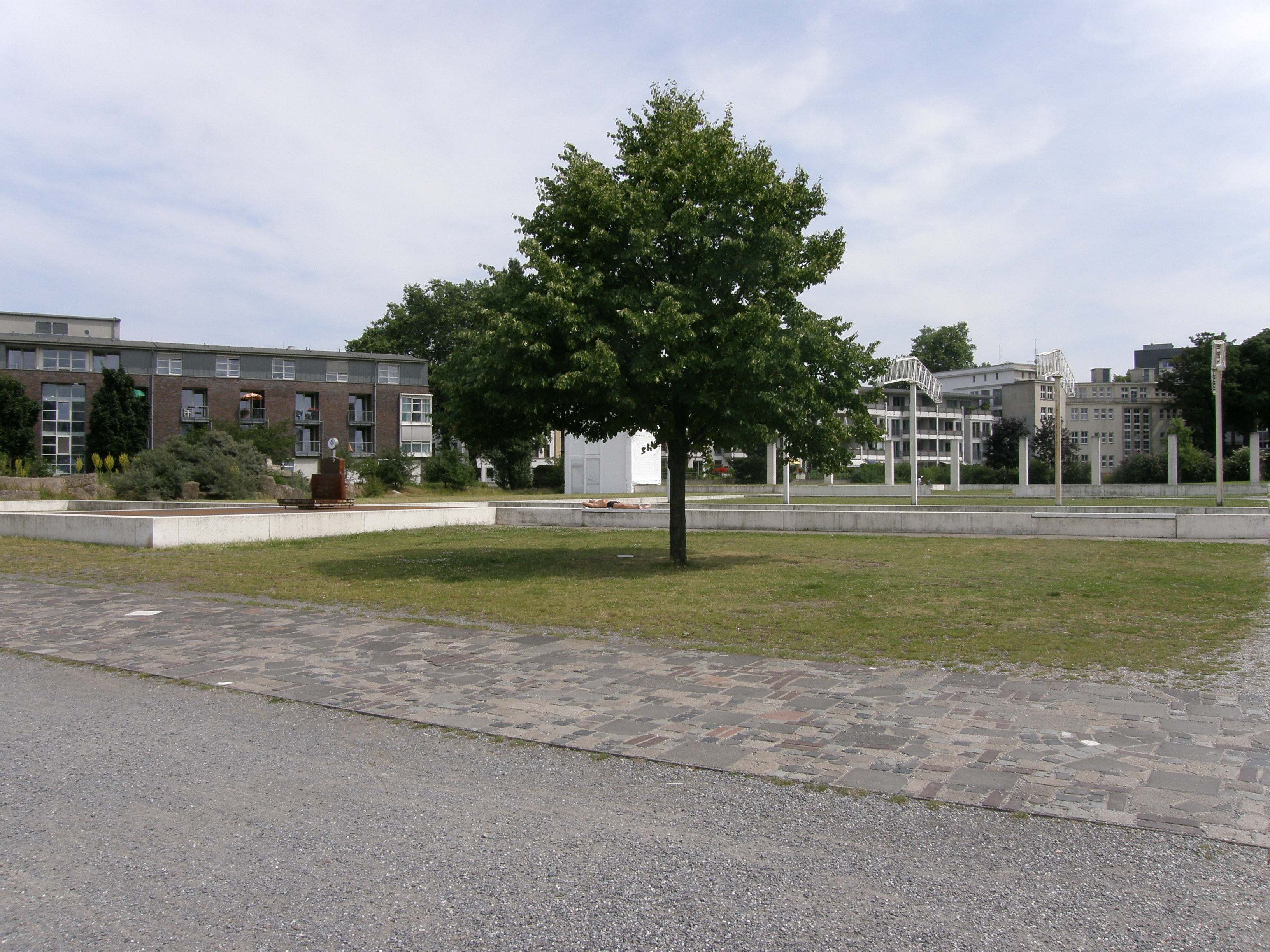 Garten der Erinnerung von Dani Karavan im Innenhafen von Duisburg, Blick nach Südosten auf die Sparzentrale, links ein Teil des Seniorenzentrums